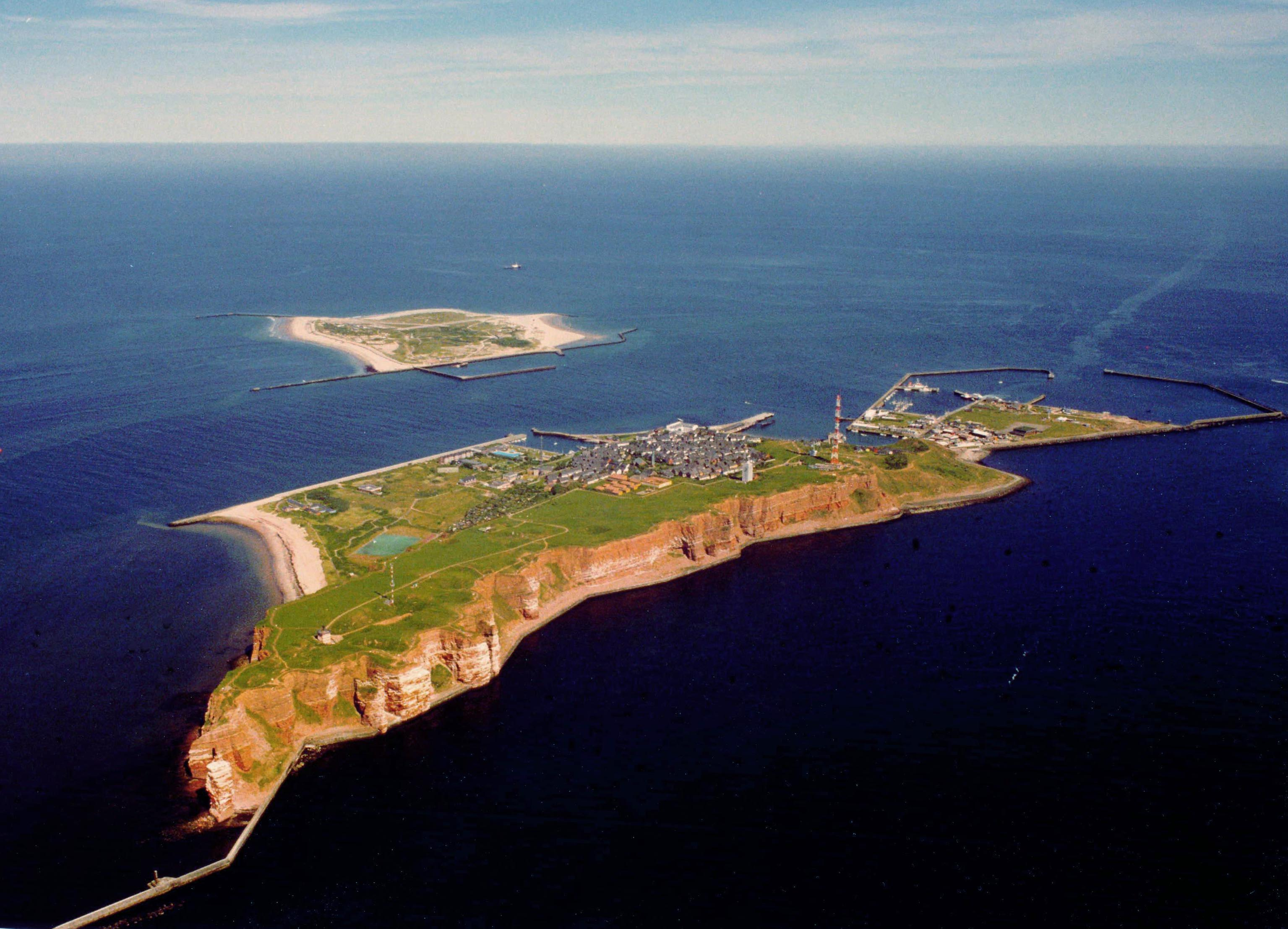 Helgoland in der Vogelperspektive (Helgoland im Vordergrund, im Hintergrund die Düne)